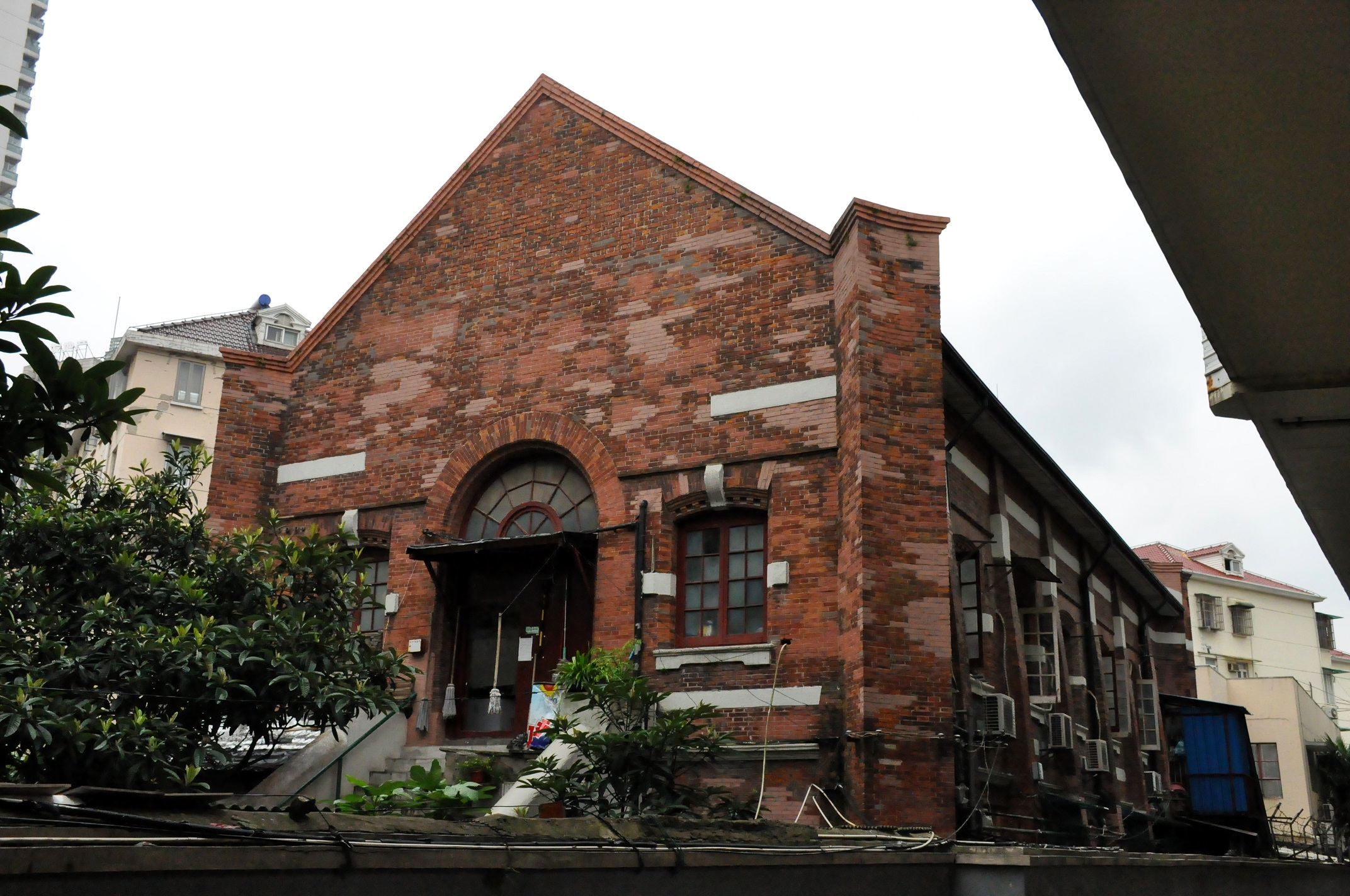 中文（中国大陆）: 印度锡克教堂旧址 东宝兴路326号